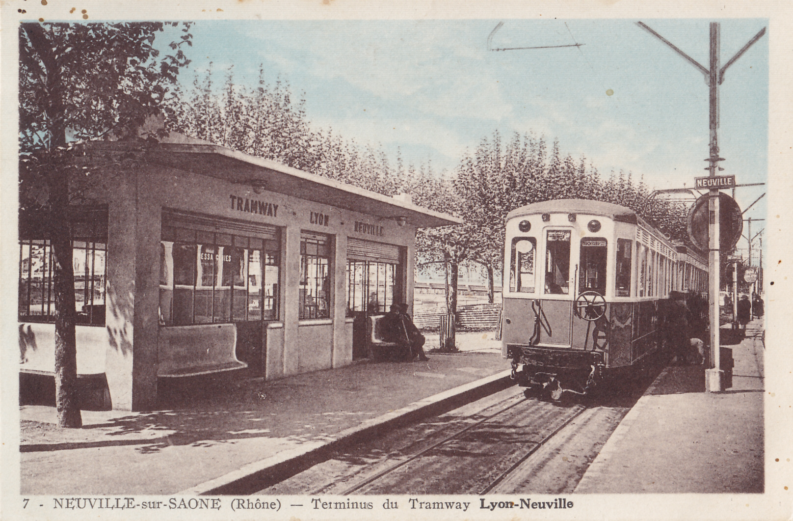 Carte postale ancienne éditée par Berger à Neuville-sur-Saône :NEUVILLE-SUR-SAÔNE - Terminus du Tramway Lyon-Neuville